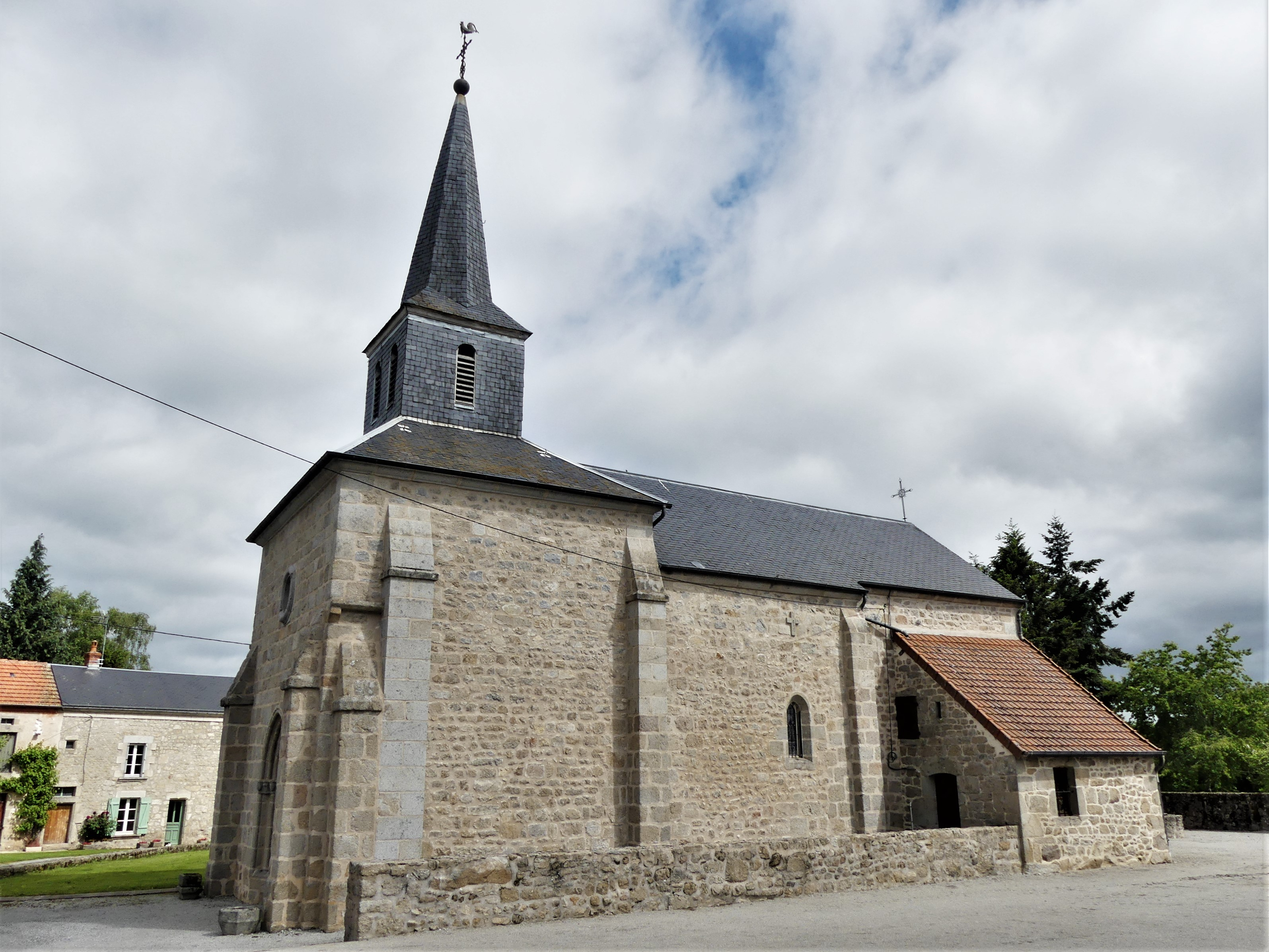 L'église de La Serre-Bussière-Vieille, Creuse, France.